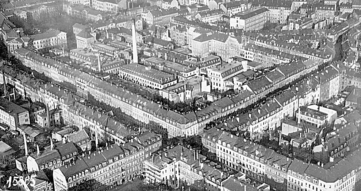 Schokoladenfabrik Hartwig & Vogel in Dresden, Freiberger Straße 37 (Luftbild vor 1945). Im Vordergrund ist die Kreuzung Ammonstr./Rosenstr. zu sehen, ganz links oben die Kreuzung Ammonstr./Freiberger Str. mit dem Maternihospital (Elsa-Fenske-Heim)